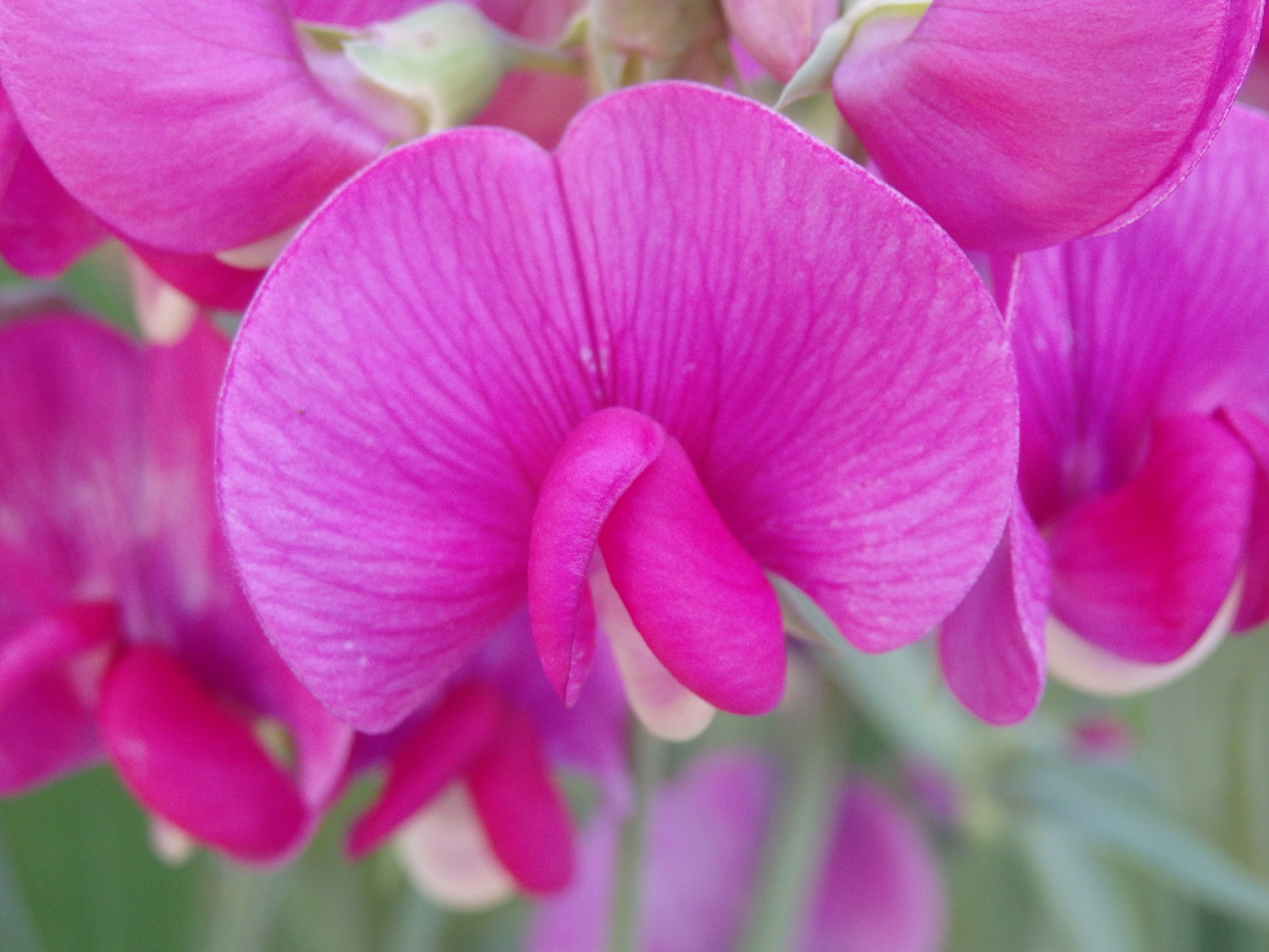 Sweet Pea